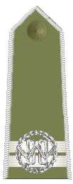 Sposób noszenia oznak podchorążego na pagonie. Na ilustracji oznaczenie "WSO" - Wyższa Szkoła Oficerska (powojenna) na dystynkcjach kaprala podchorążego. Pagon obszyty białym sznureczkiem, oznaczającym podchorążego zawodowego, czyli kandydata na zawodowego oficera. Wykonanie własne